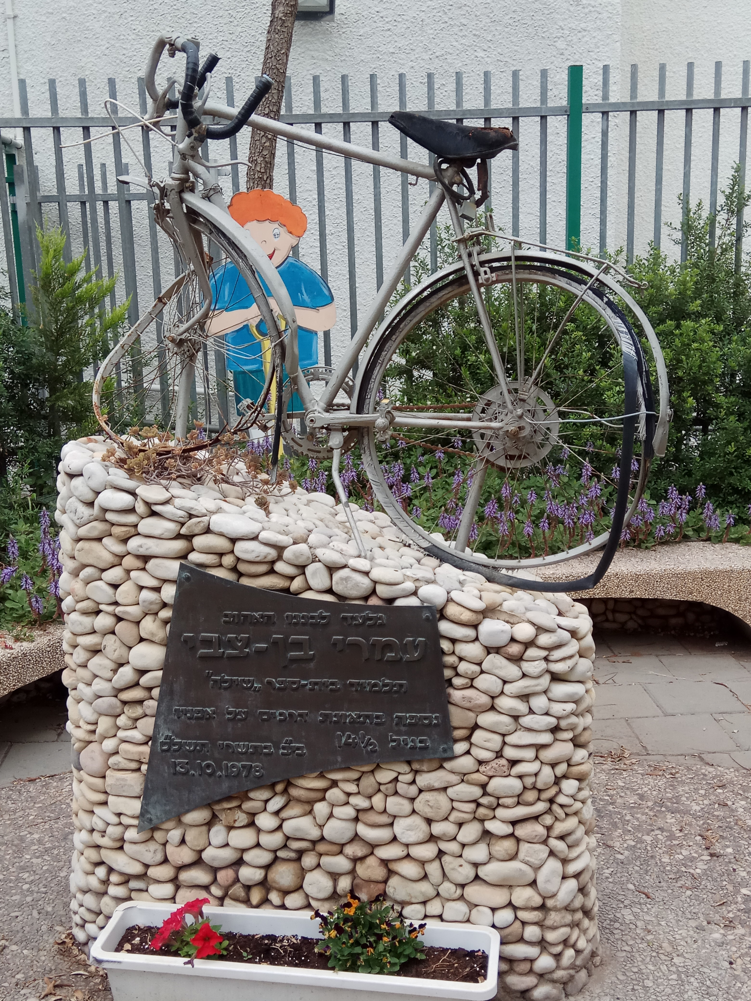 אנדרטה לתלמיד בת הספר שילה (כעת בן גוריון) שנהרג בתאונת דרכים ברכבו על אופניו